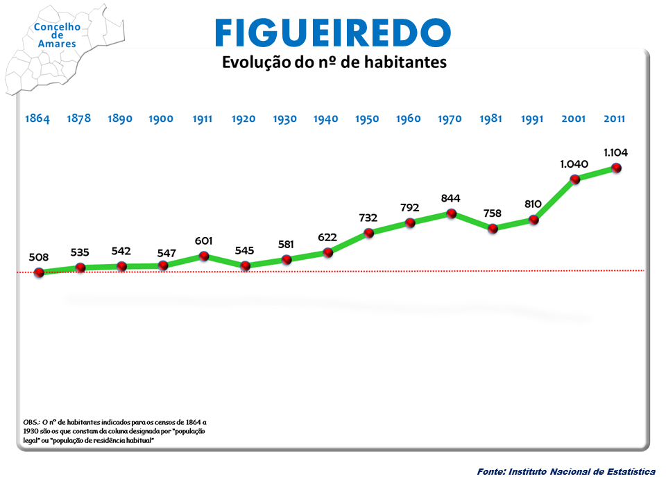 Censo 2011